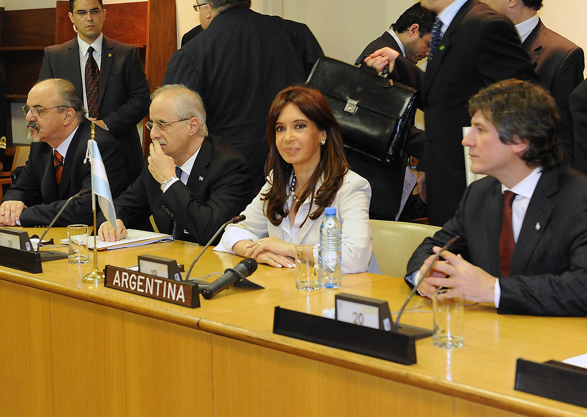 Cristina Fernández en la sede de la UNO, junto a los ministros de Trabajo, Carlos Tomada, Relaciones Exteriores, Jorge Taiana, y Economía, Amado Boudou.